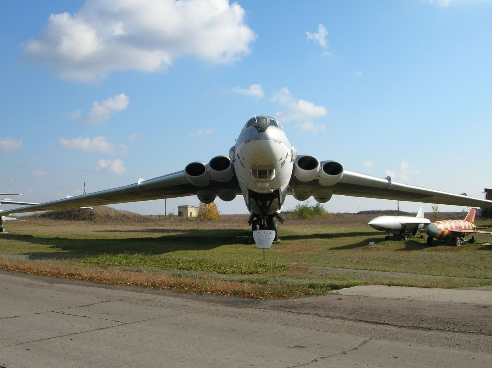 Самолёт 3МС-2 на авиабазе Энгельс. 3МС-2 — самый большой в мире самолёт-заправщик; создан на базе бомбардировщика М-4. Музей Дальней авиации России при авиабазе Энгельс, Саратовская область, Россия.